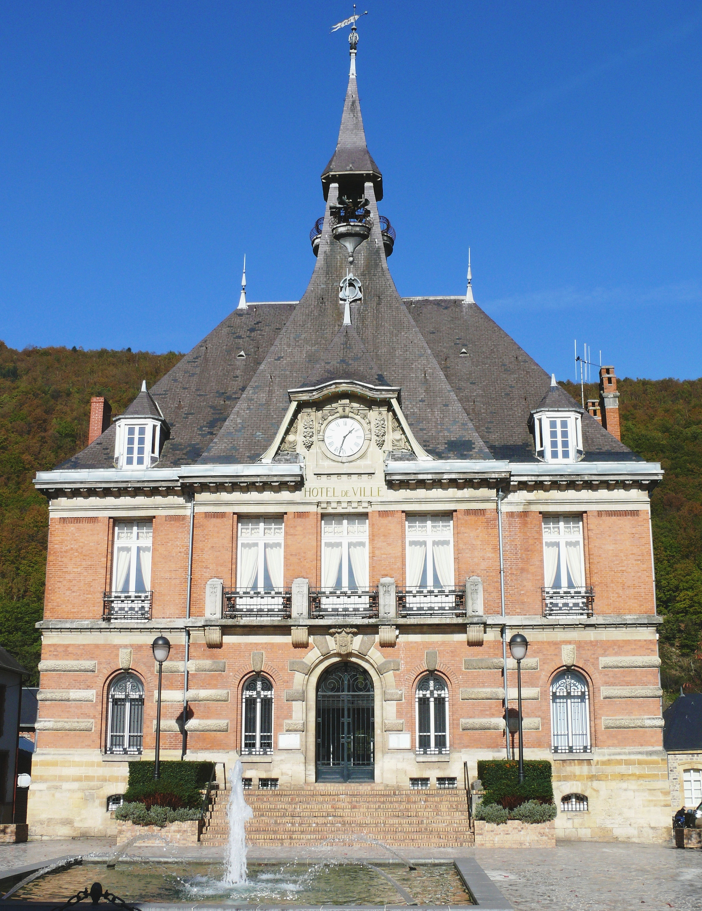 Haybes - Hôtel de ville